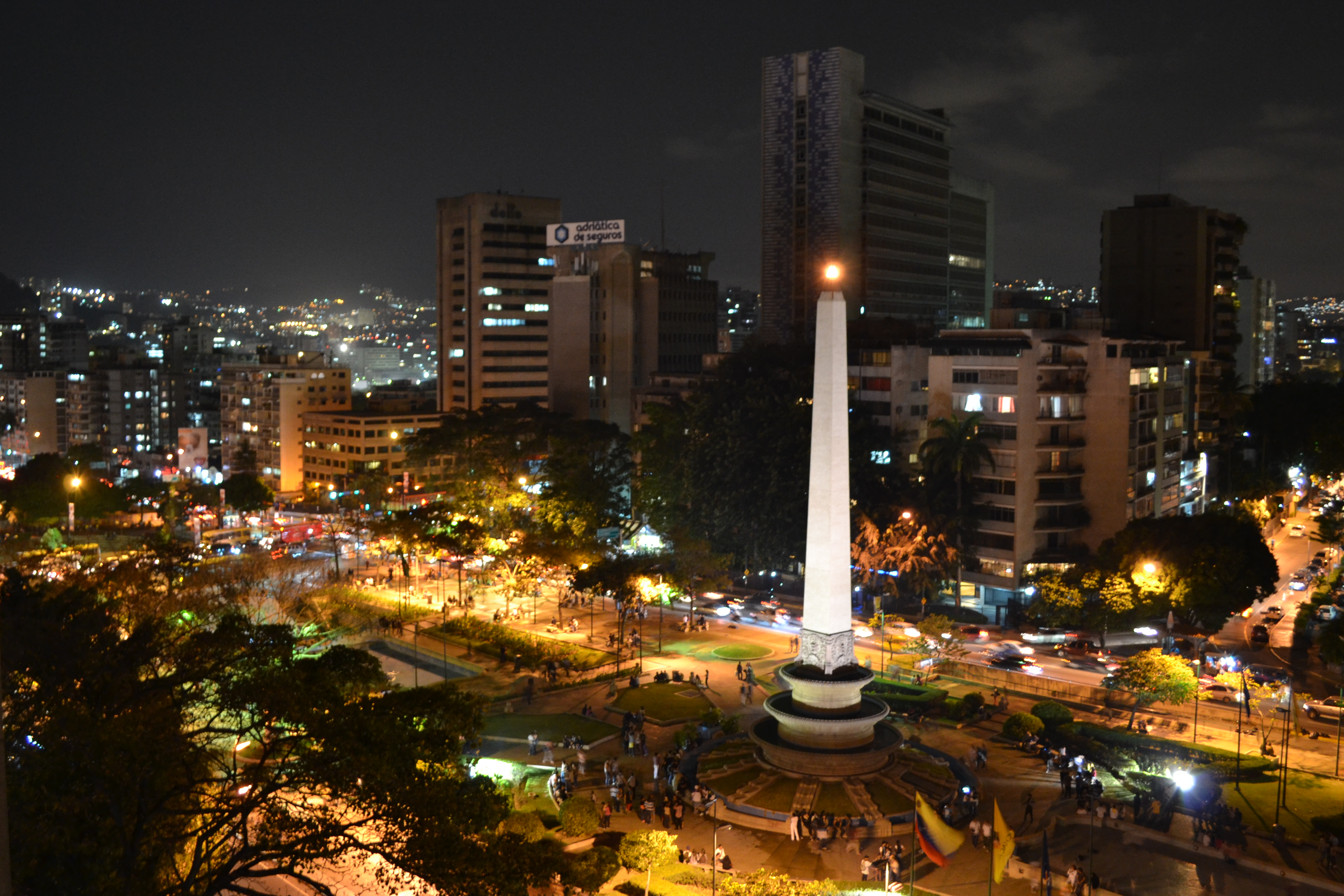 Miranda, Venezuela